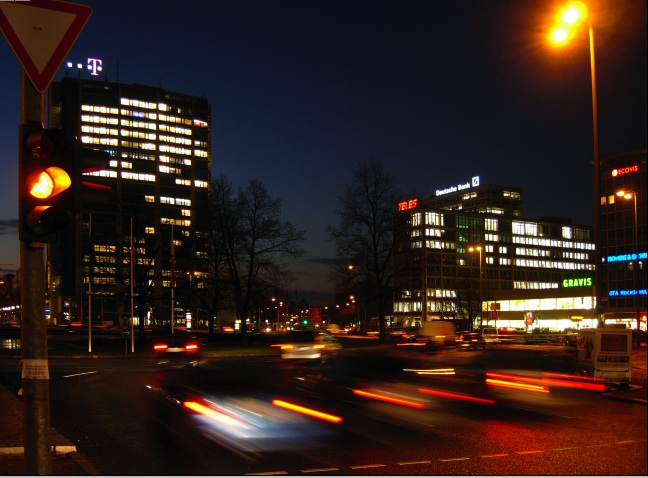 Berlin, Ernst-Reuter-Platz aus der Straße des 17. Juni gesehen, und zwar bei Nacht